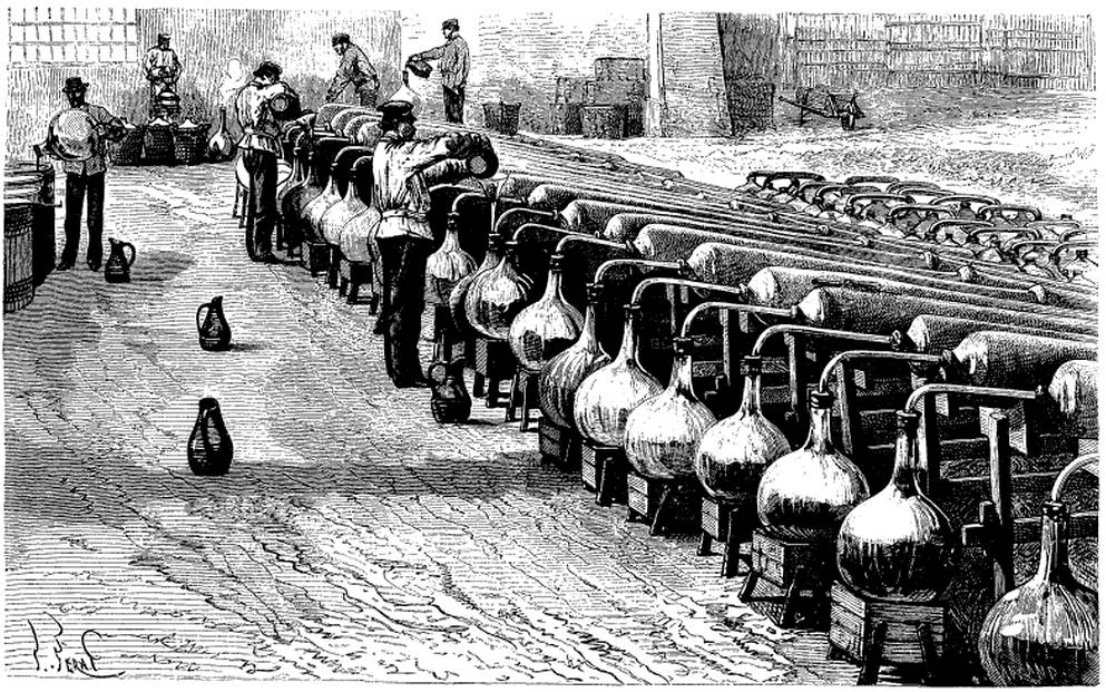 Fabrication du fulminate de Mercure 1871